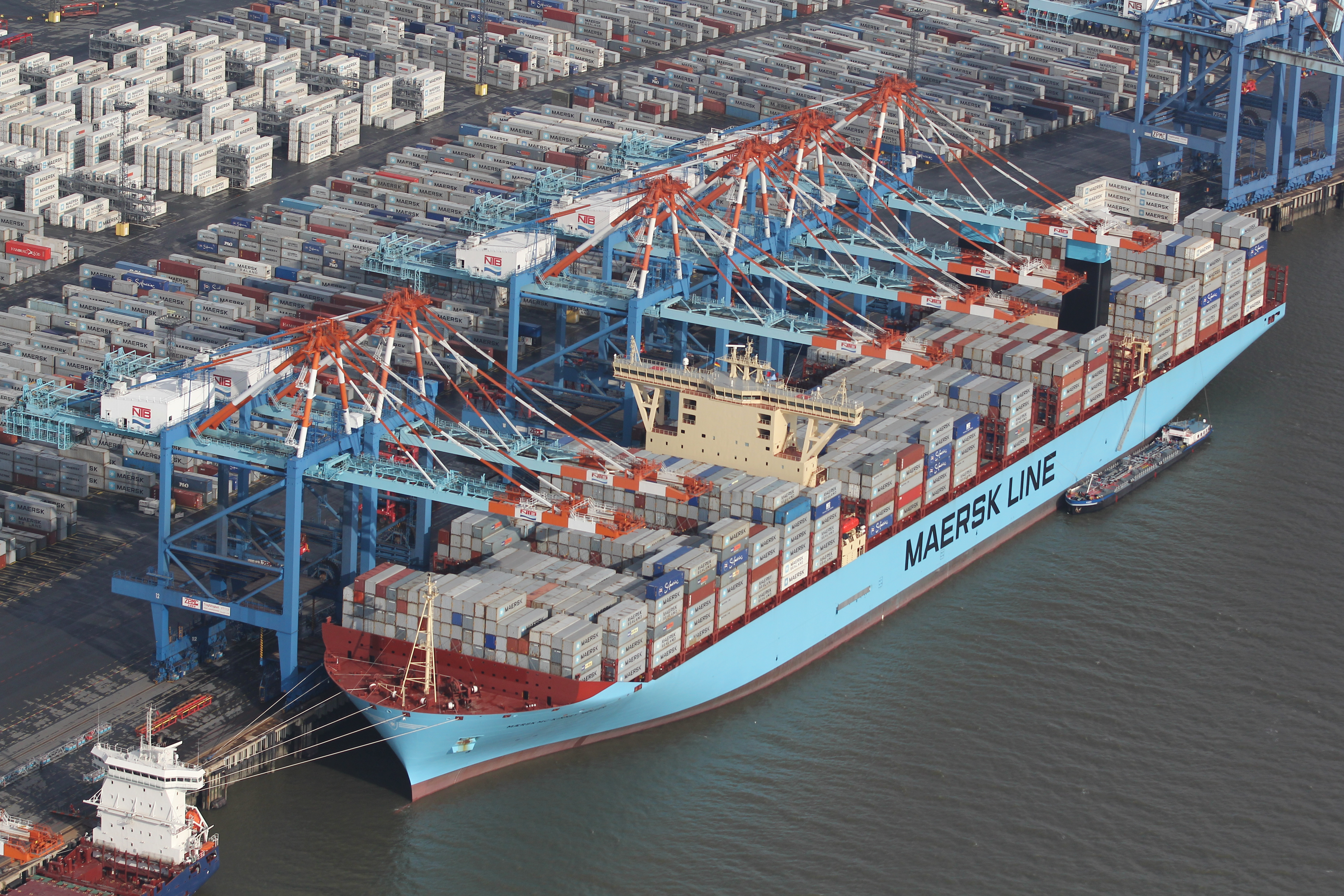 „Mærsk Mc-Kinney Møller" maiden call Bremerhaven 2013-08-18